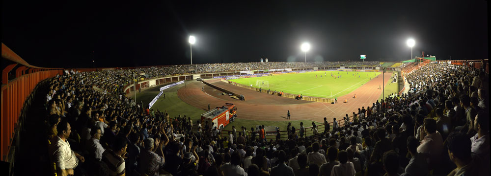 سراسرنما استادیوم سردار جنگل رشت در یک بازی خانگی داماش گیلان